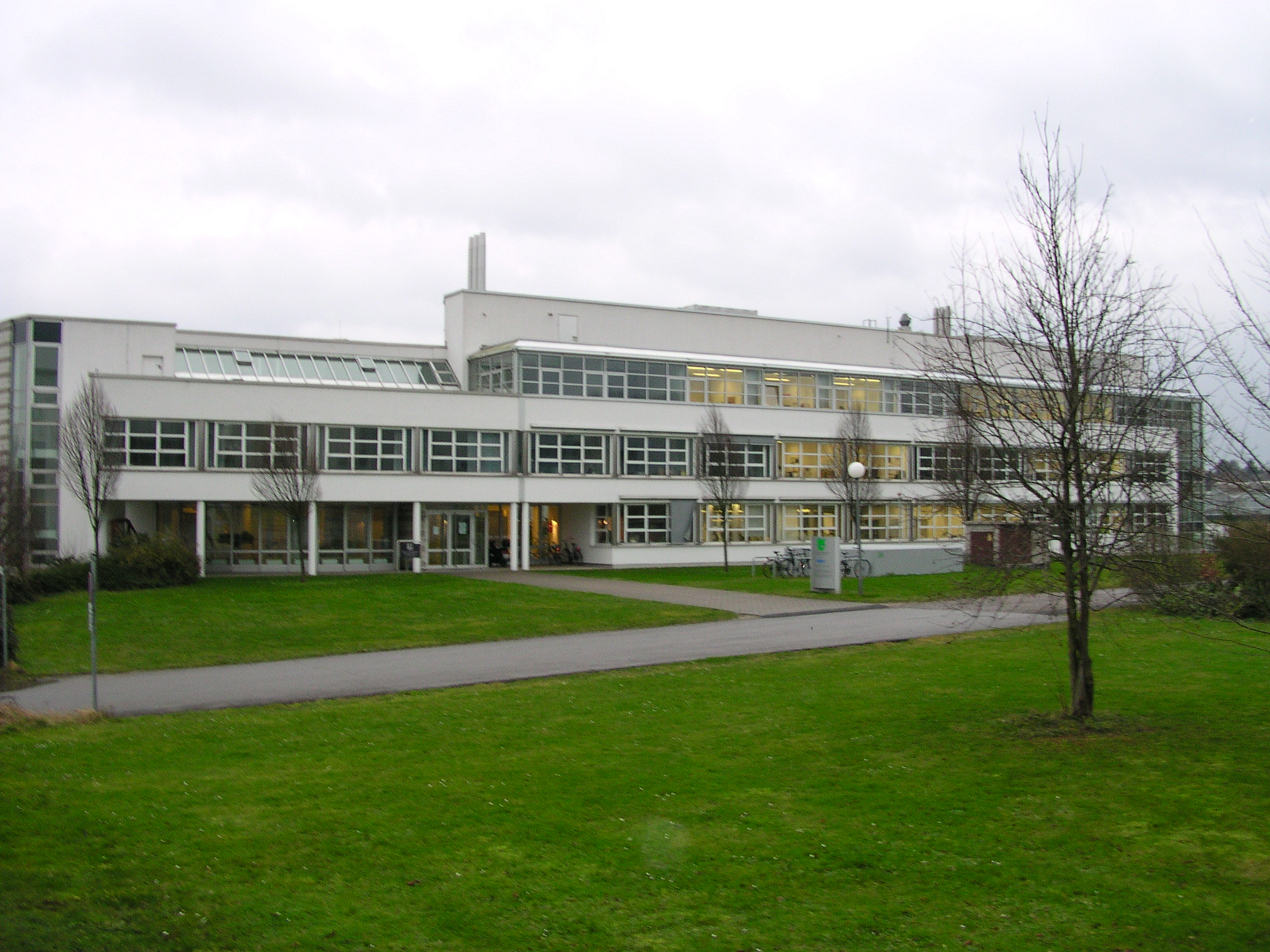 RWTH Aachen, Institut für Kunststoffverarbeitung in Industrie und Handwerk (Bürotrakt)